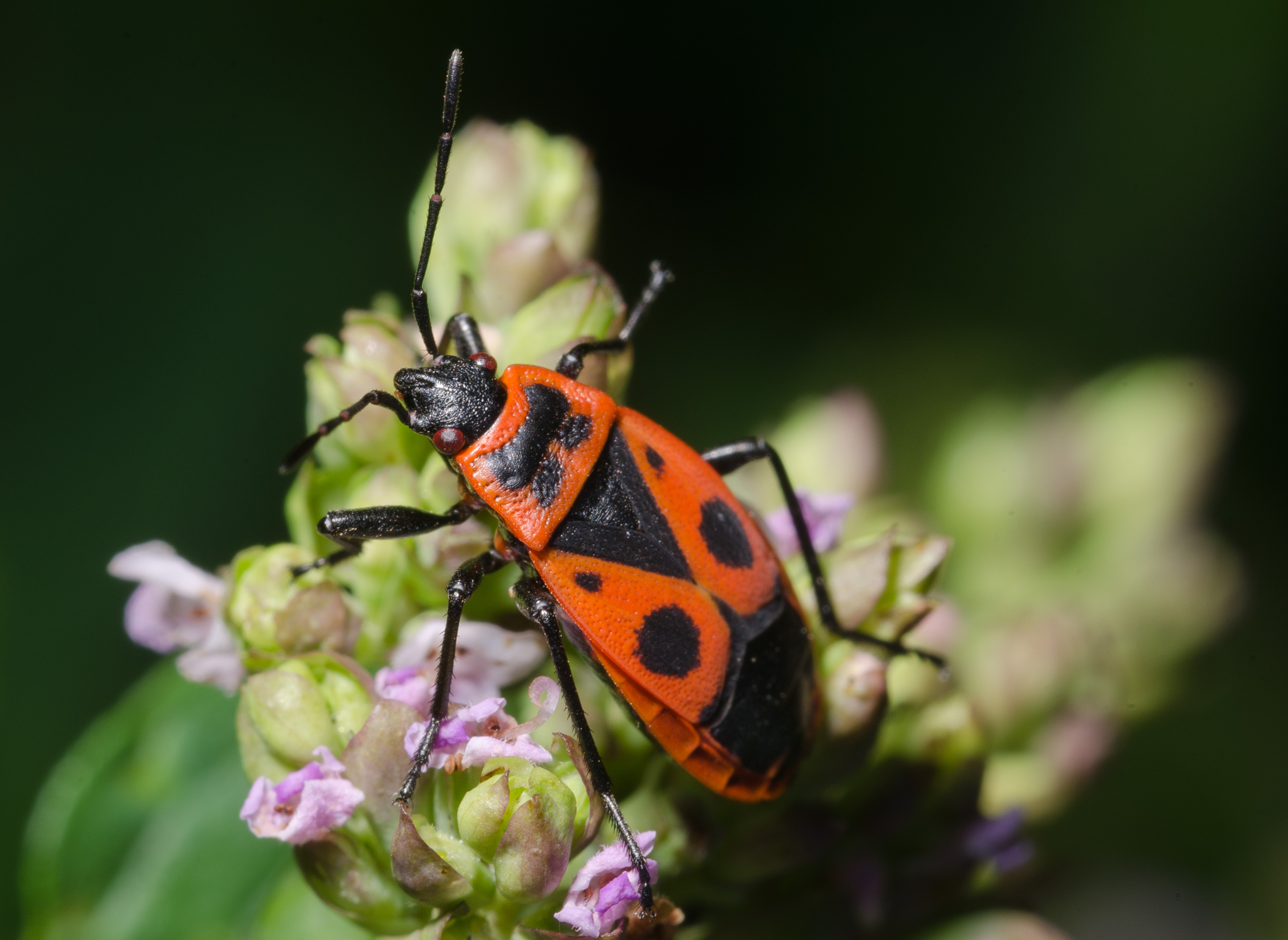 Gemeine Feuerwanze (Pyrrhocoris apterus)